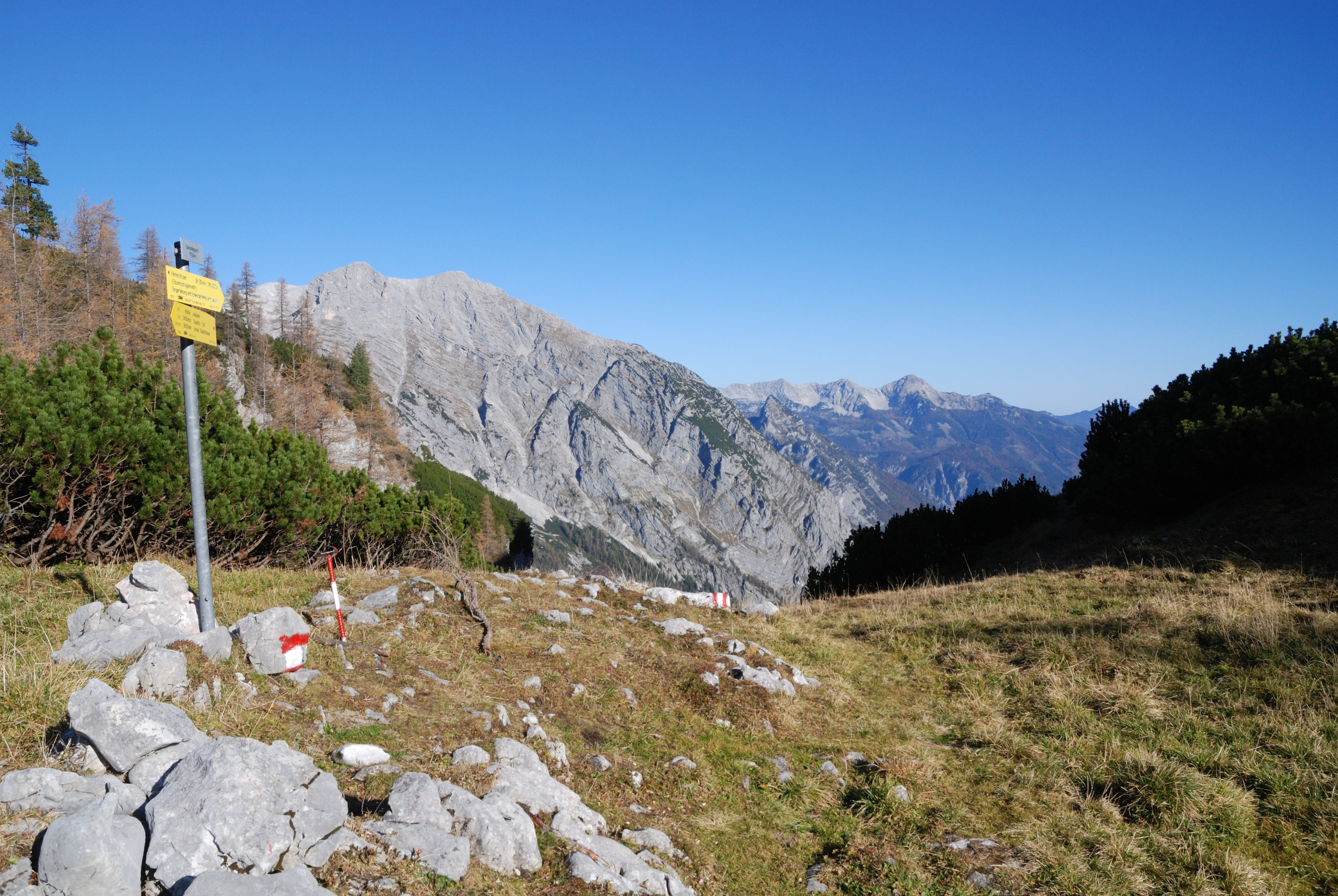 Salzsteigjoch, Totes Gebirge, Österreich. Blick nach Norden zum Hebenkas